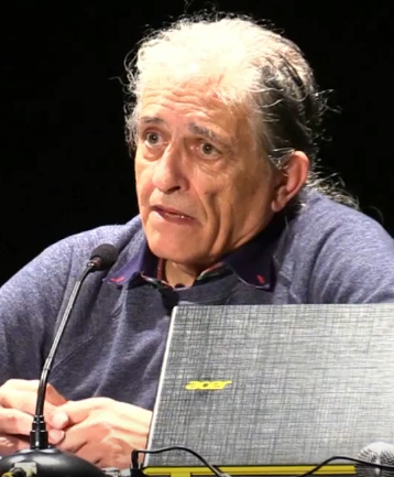 Ramón Cotarelo en Olot, 2016.